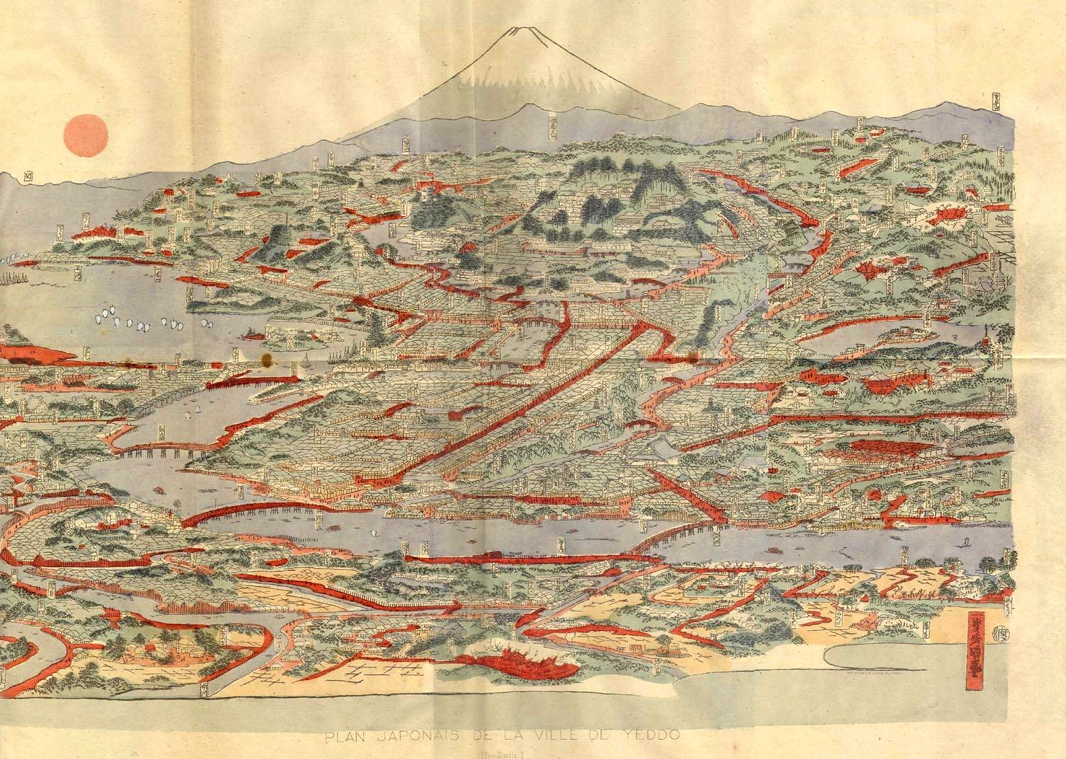 Vue et plan de la ville de Yeddo au Japon. Hors-texte du livre "Notes sur le Japon, la Chine et l'Inde" 1861